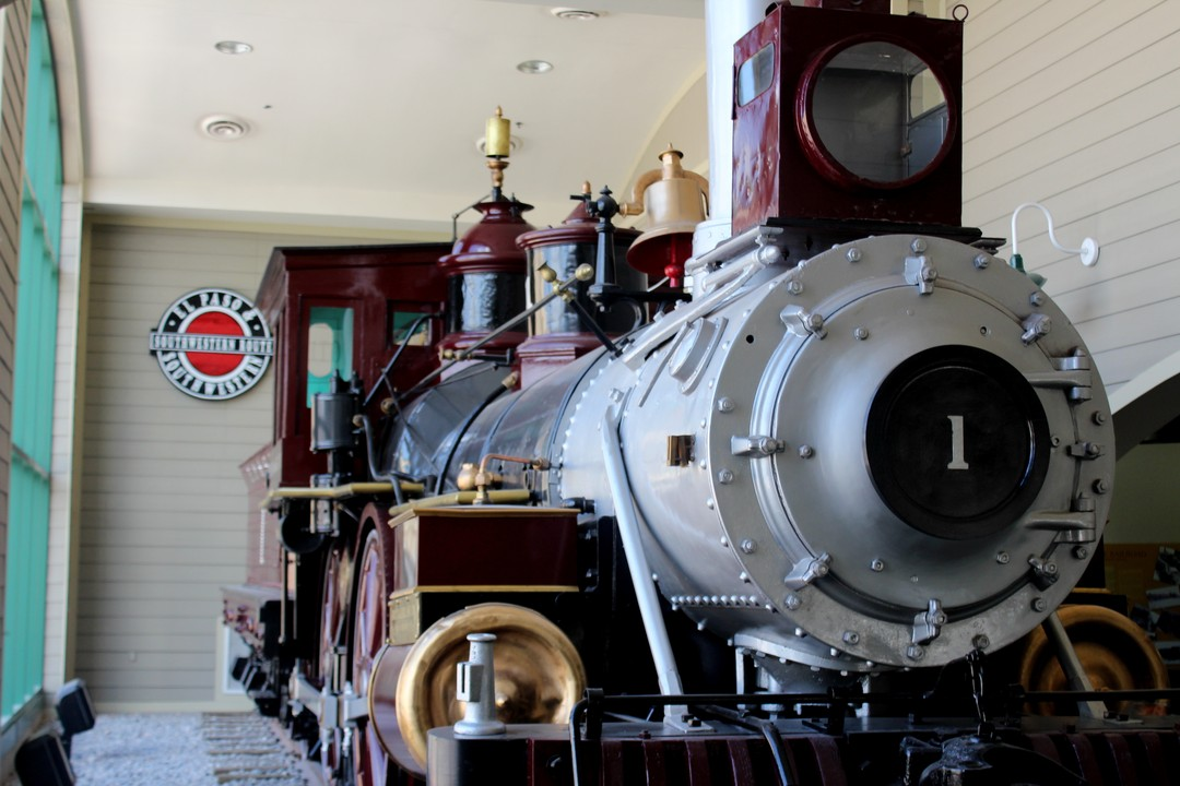 via Instagram ift.tt/2aS9IjB